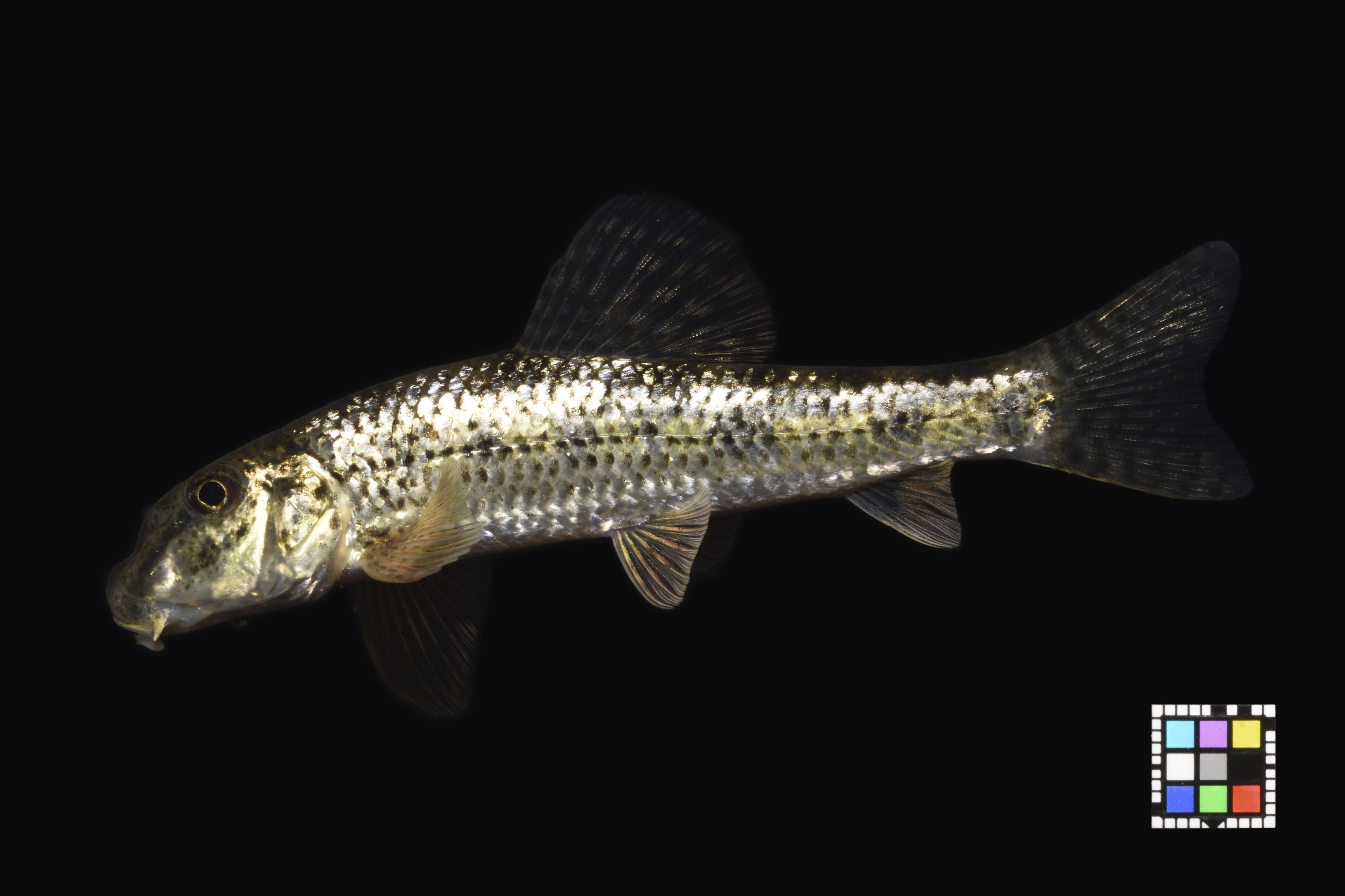 ツチフキの成魚、筑後川水系。詳細